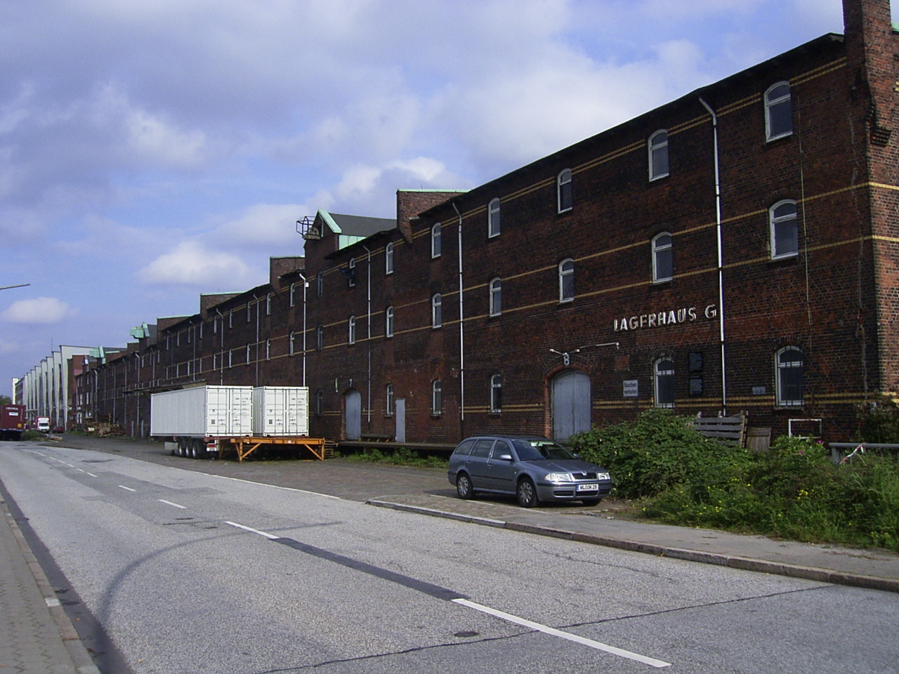 Lagerhaus G am Dessauer Ufer in Kleiner Grasbrook, 1944/45 als Außenlager des KZ Neuengamme genutzt.This is a photograph of an architectural monument.